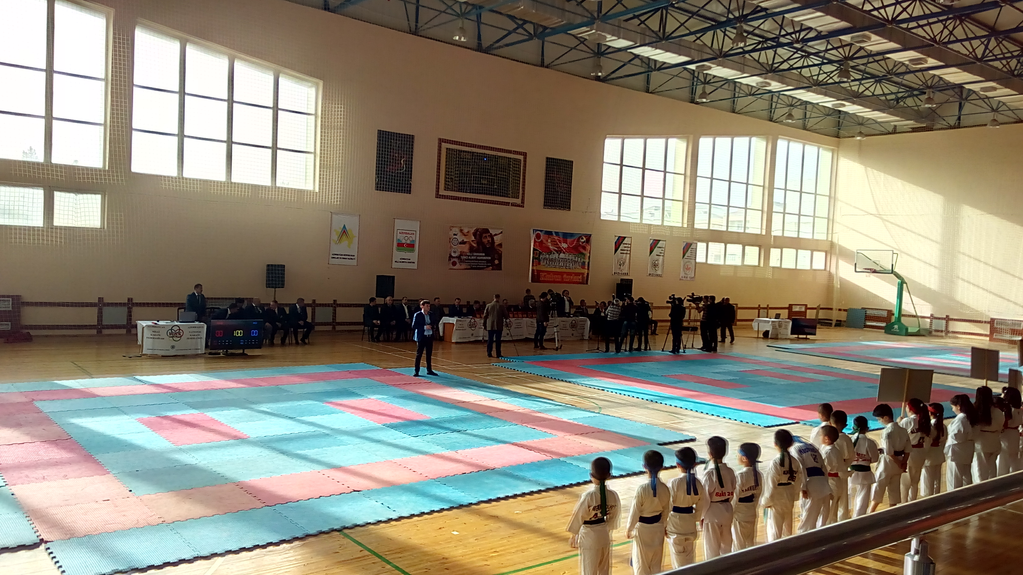 Sumqayıt OİK-də Albert Aqarunovun xatirəsinə həsr olunmuş karate üzrə açıq çempionat